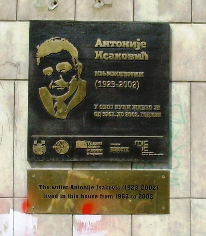 Antonije Isaković, tabla na zgradi u kojoj je stanovao, Studentski trg, Beograd. Slikao Goldfinger